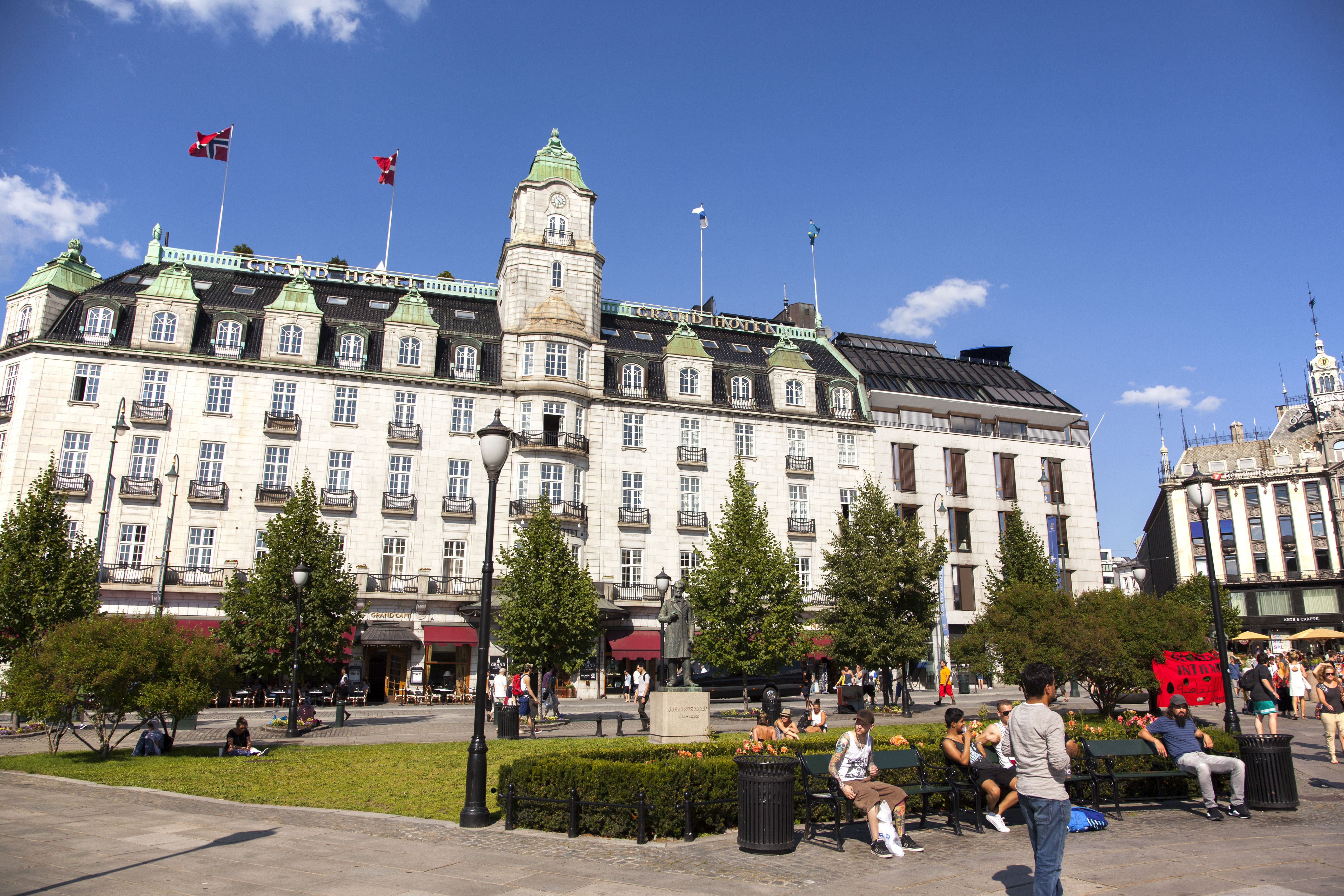 Grand Hotel i Oslo.